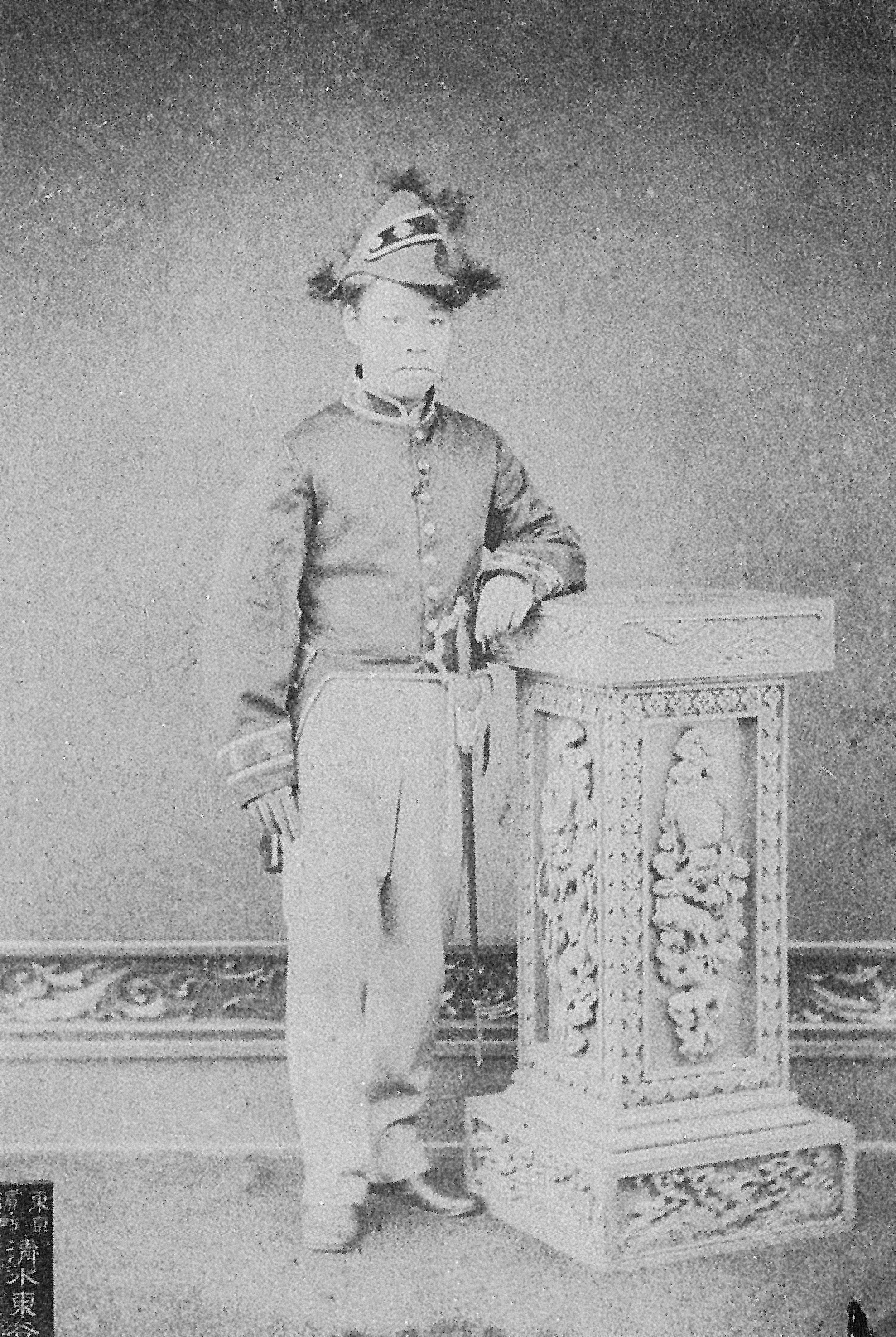 森忠儀の肖像写真。